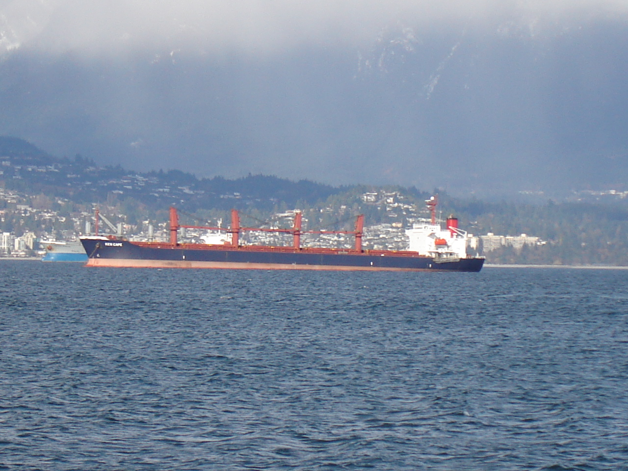 visual